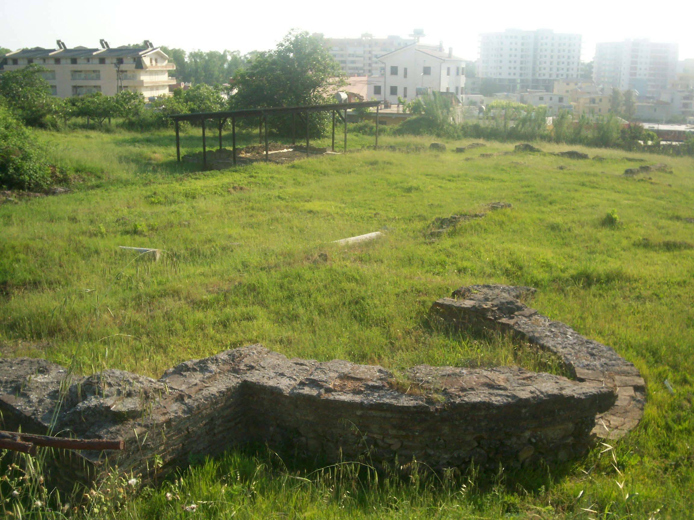 Bazilika e Shëmëhillit në Arapaj, Durrës